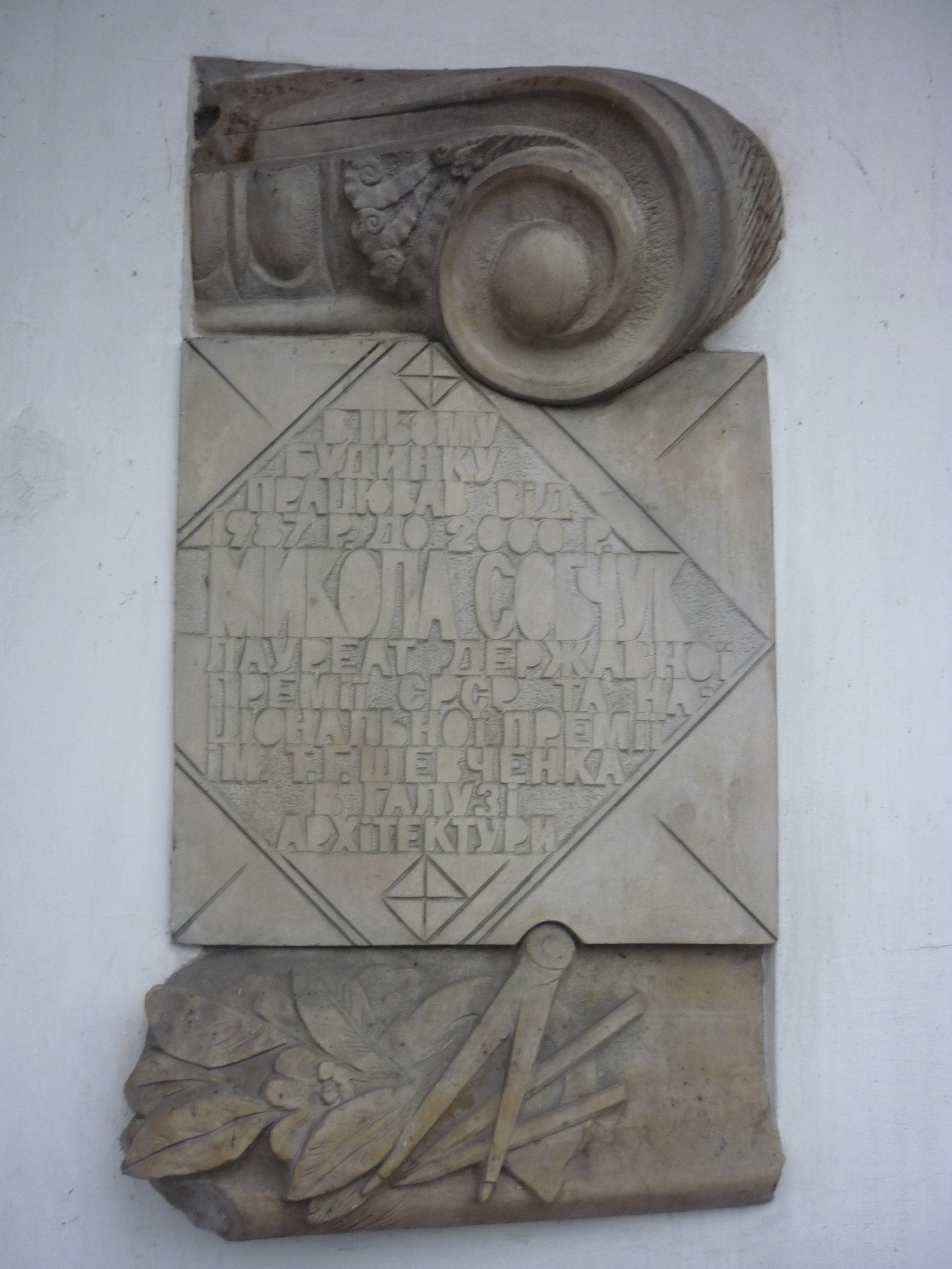 Пам'ятна табличка на честь архітектора Миколи Собчука